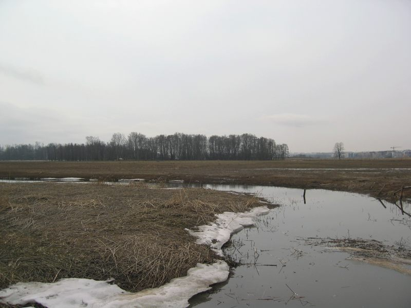 Kaislikkoa Vanhankaupunginlahdella huhtikuussa 2005.